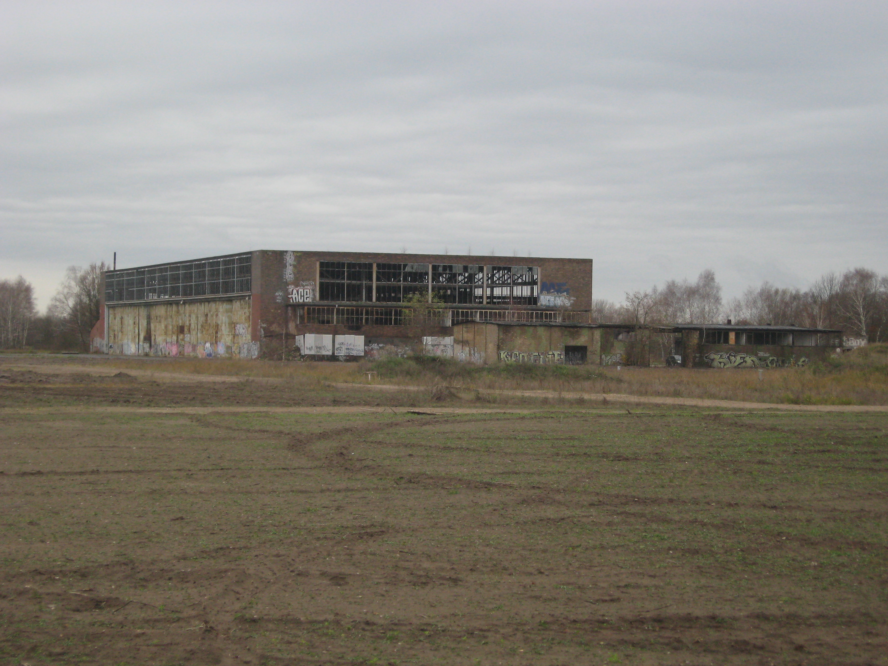 Einfliegehalle der Heinkel-Werke auf dem ehemaligen Flugplatz bei Oranienburg Ansicht von Osten